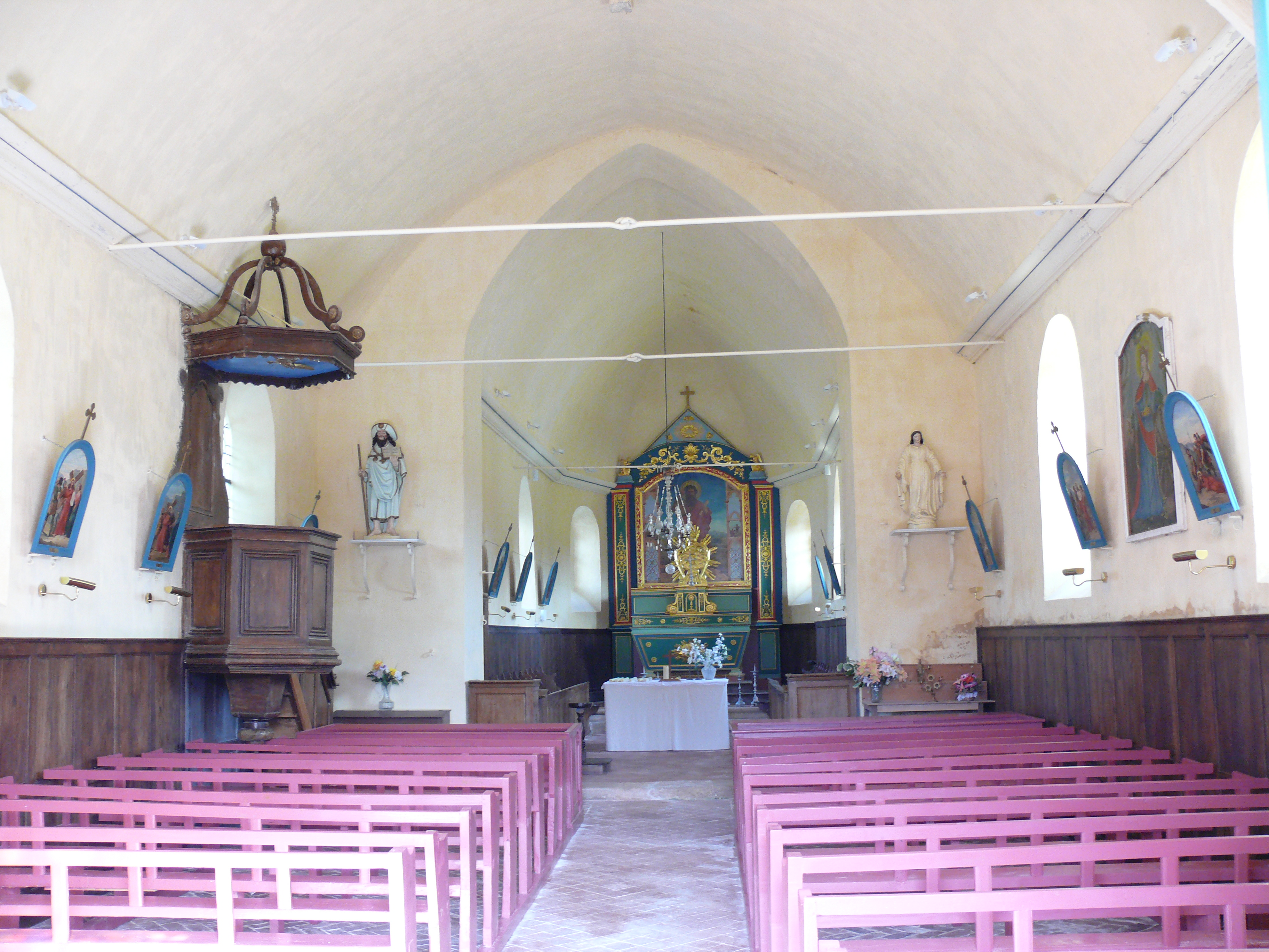 Le Gallet - Intérieur de l'Eglise Saint-Jacques